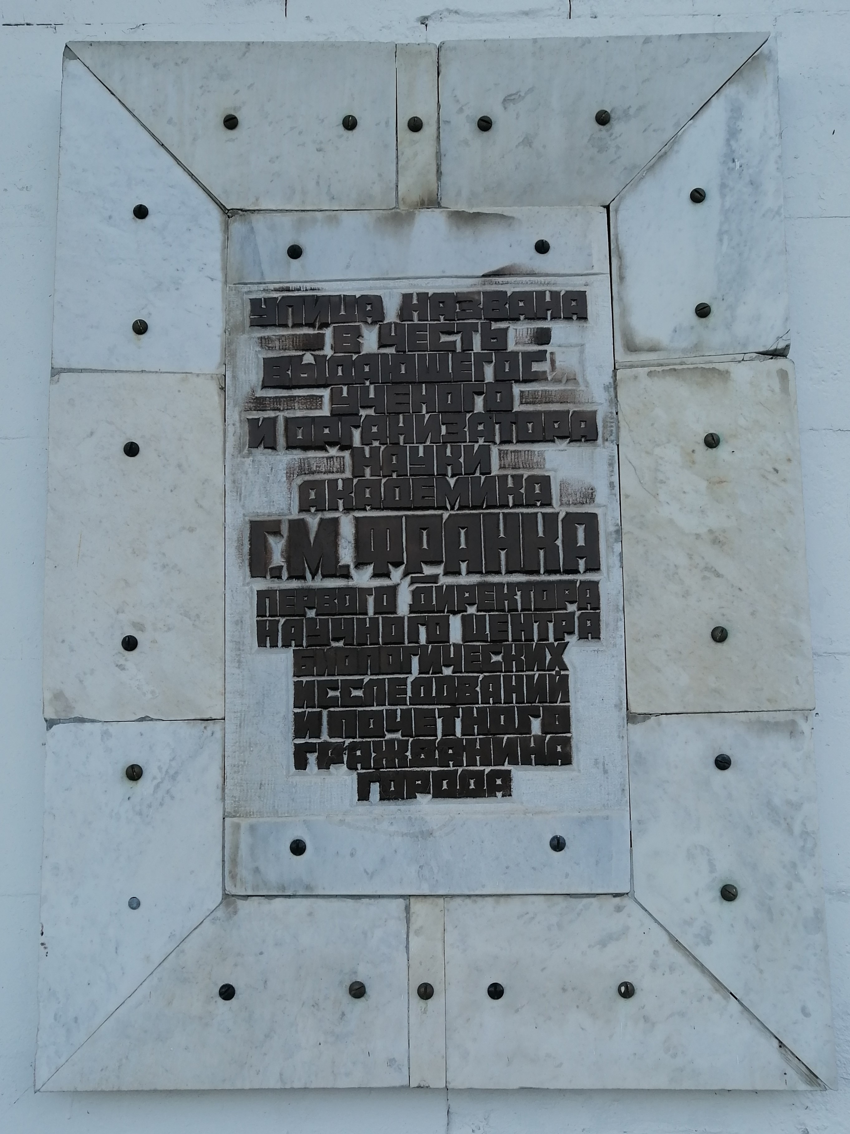 Памятный знак о том, что улица названа в честь академика Г.М.Франка. Памятный знак расположен на гостинице "Пущино" по адресу: г. Пущино, улица Академика Франка, 5а